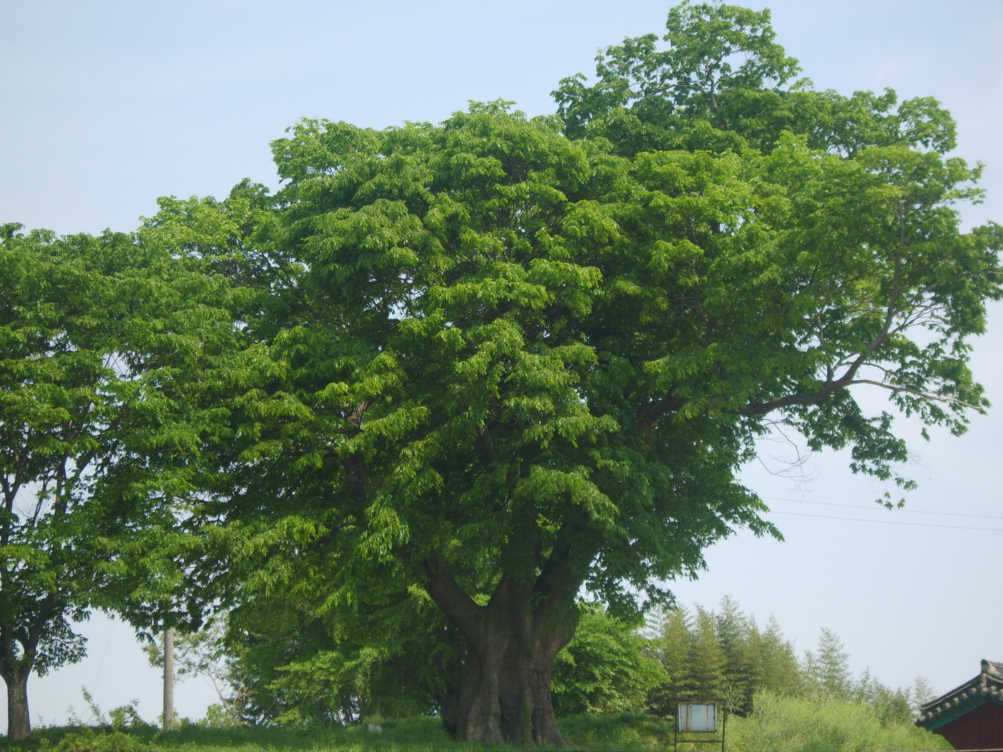 Zelkova serrata in Damyang Korea. 담양에 사는 느티나무.